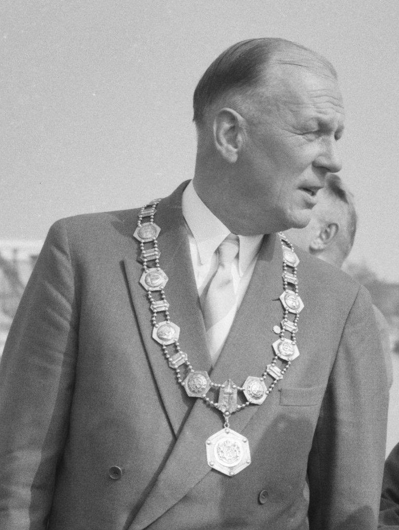 Collectie / Archief : Fotocollectie Anefo Reportage / Serie : [ onbekend ] Beschrijving : Opening Gemeentelijke Jachthaven in Harderwijk. Burgemeester G. J. Numan en mr. H. W. Bloemers Datum : 25 juli 1961 Locatie : Harderwijk Trefwoorden : Openingen, jachthavens Persoonsnaam : Bloemers, H.W., Burgemeester G. J. Numan Fotograaf : Bilsen, Joop van / Anefo Auteursrechthebbende : Nationaal Archief Materiaalsoort : Negatief (zwart/wit) Nummer archiefinventaris : bekijk toegang 2.24.01.04 Bestanddeelnummer : 912-7670